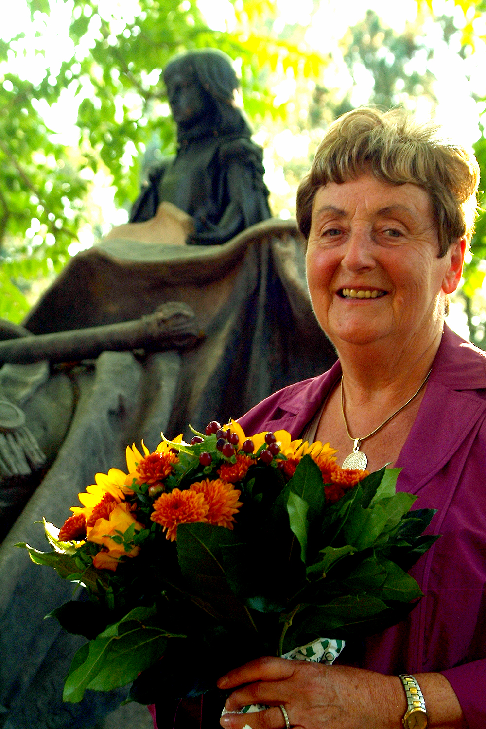 Gitta Kirchhefer mit einem Blumenstrauß während der Feierlichkeiten zur Präsentation der durch ihre Arbeit initiierten Restauration der Grabstätte von Oberhofmarschall Ernst von Malortie auf dem Herrenhäuser Friedhof in Hannover ...